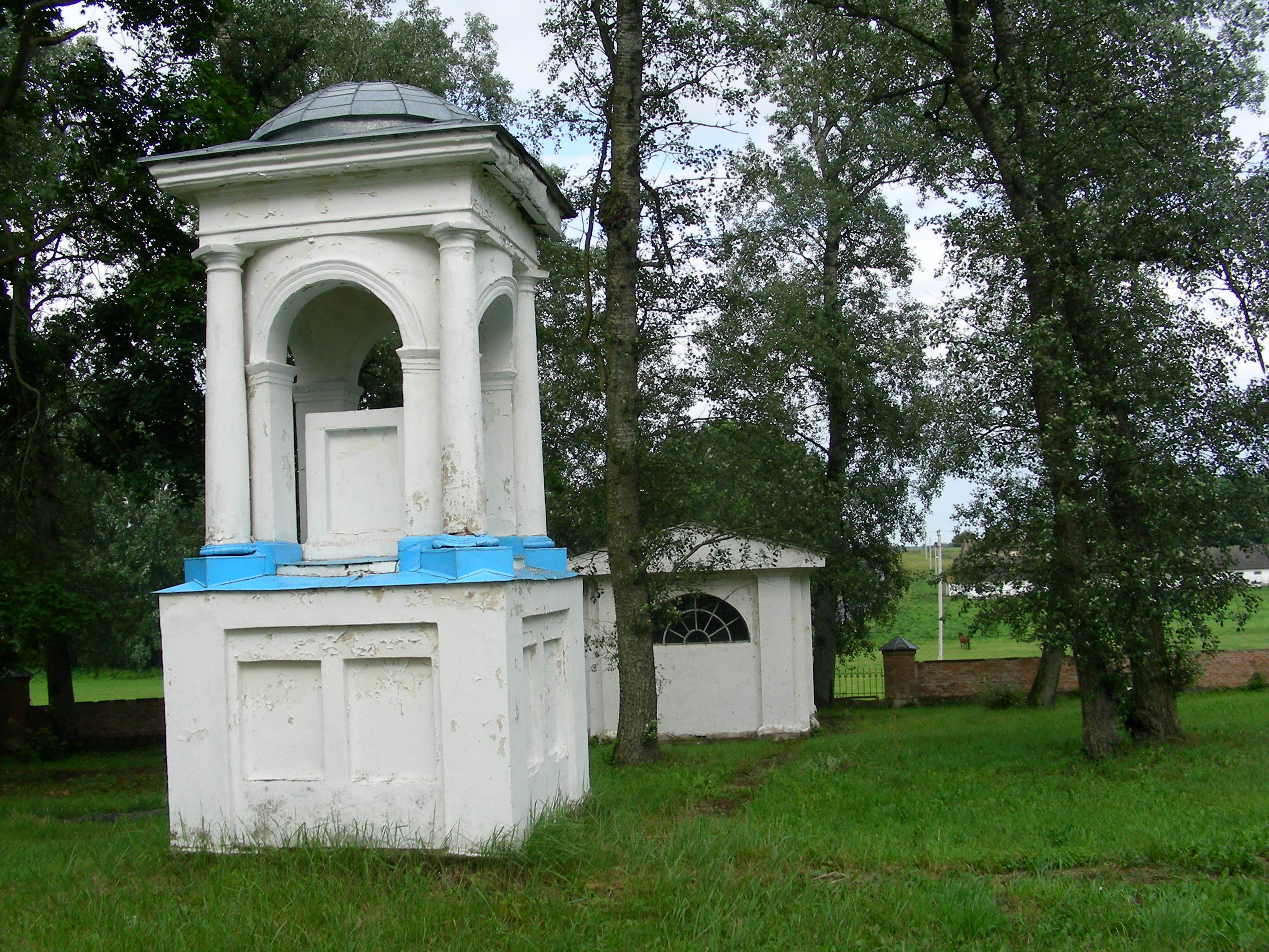 Беларуская (тарашкевіца): Сьвята-Пакроўская царква. в. Вялікая Ліпа This is a photo of Belarusian heritage monument. Reference number: 613Г000485 ( WLM)